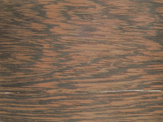 Gemessertes Furnier der Wenge, geölt, nicht geschliffen